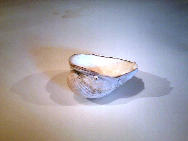 Concha de loco (Concholepas concholepas)